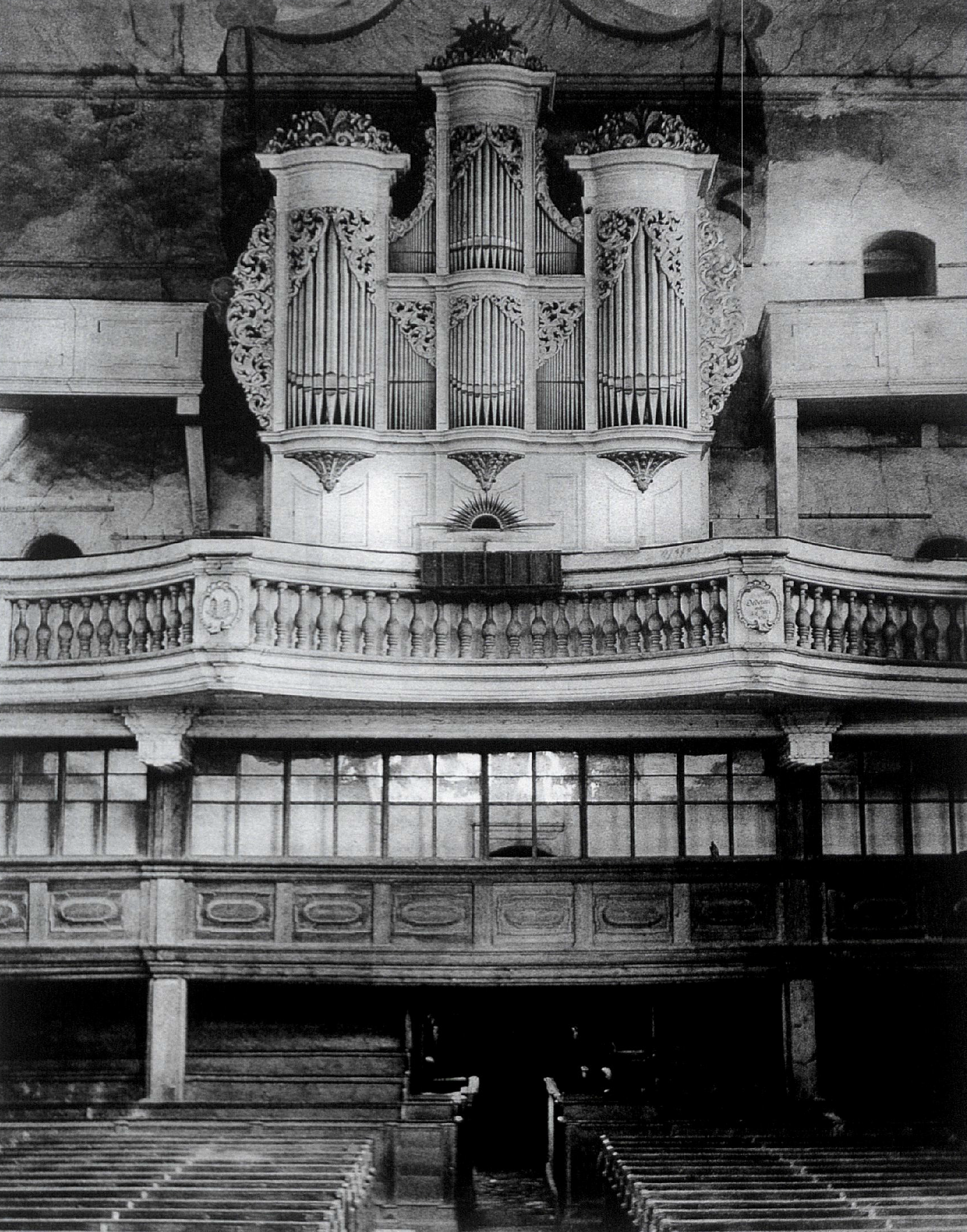 Orgel von Gottfried Silbermann (1727) in der Stadtkirche Oederan, Sachsen, Deutschland